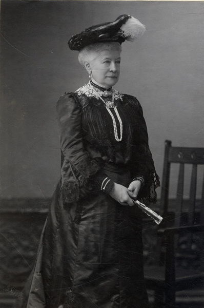 Sophie Pauline Henriette Marie, Markgräfin von Baden (geb. 07.08.1834, gest. 06.04.1904) - Tochter des Markgrafen Wilhelm, Gemahlin des Fürsten Woldemar von Lippe